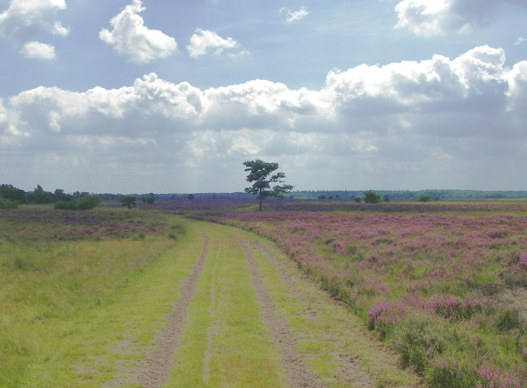 Het Sterkselse pad op de Strabrechtse heide.